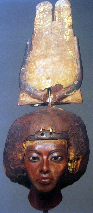 Busto de la Gran Esposa Real del faraón Amenhotep III, Tiya, también nombrada Tiy o Tiye.